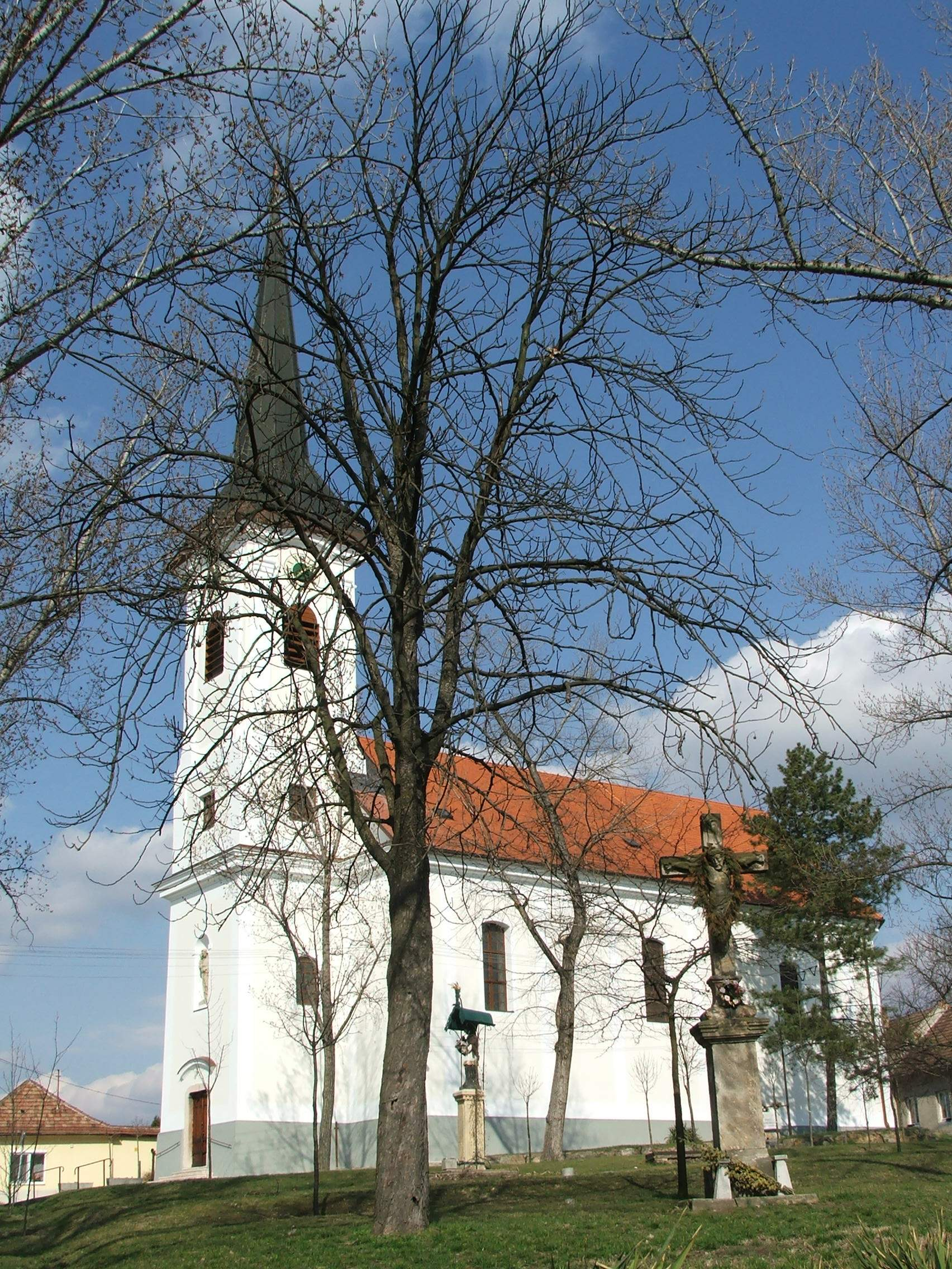 Church of Esztergom-Szentgyörgymező, Hungary